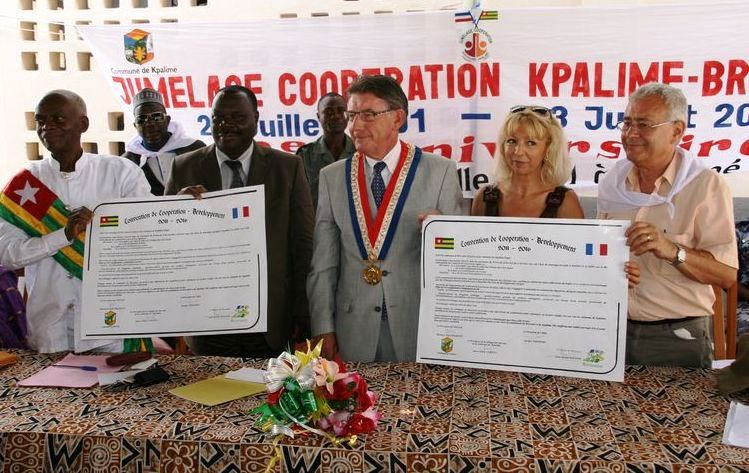 Français